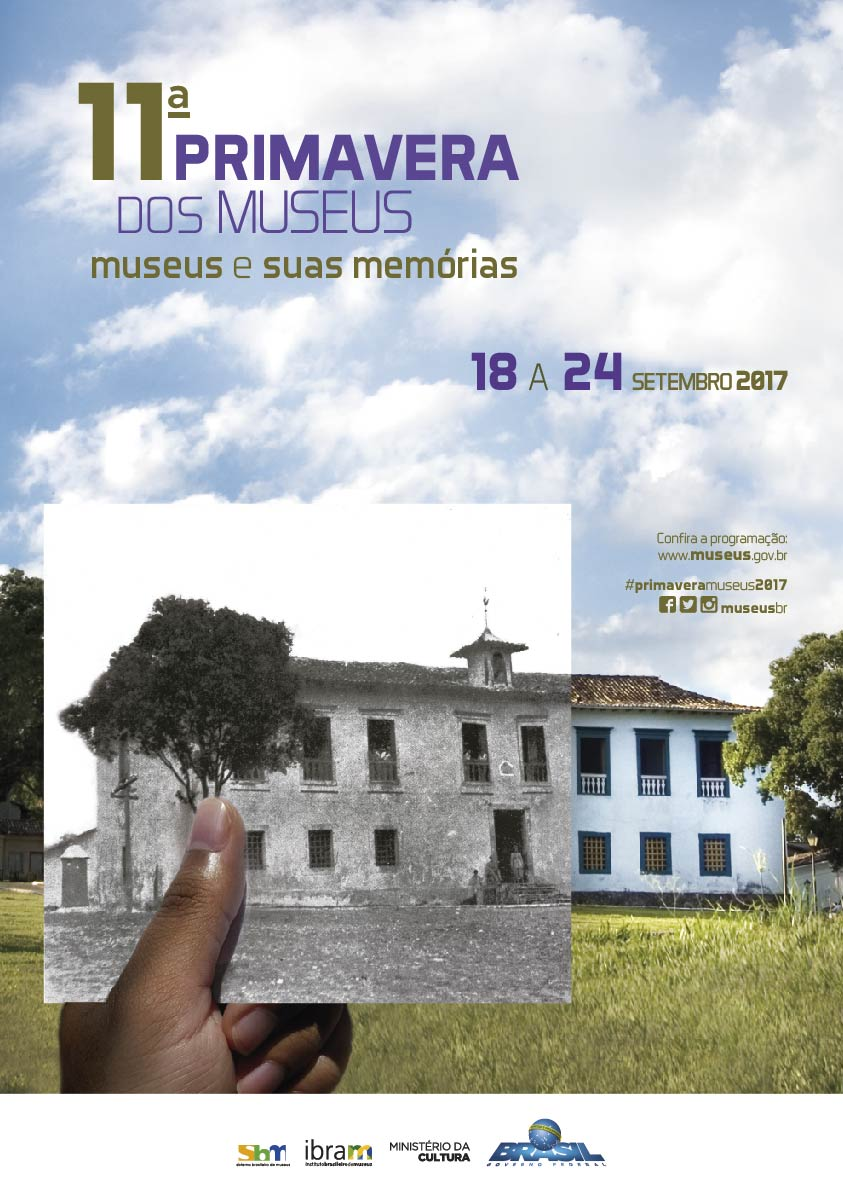 Imagem disponível no acervo digital do Ibram